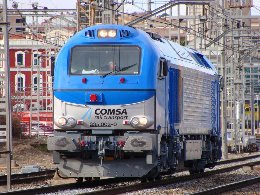 La 335.003 de Comsa (Euro 4000 de Vossloh), aturada a la sortida de l'estació de Martorell esperant la sortida d'un rodalies, per rependre la marxa en direcció Castellbisbal.